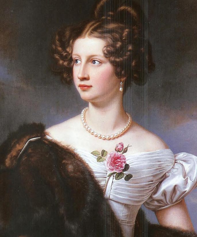 Amalie Adlerberglabel QS:Len,"Amalie Adlerberg" label QS:Lja,"アマーリエ・フォン・レルヒェンフェルト" label QS:Lde,"Amalie Freiin von Kruedener"